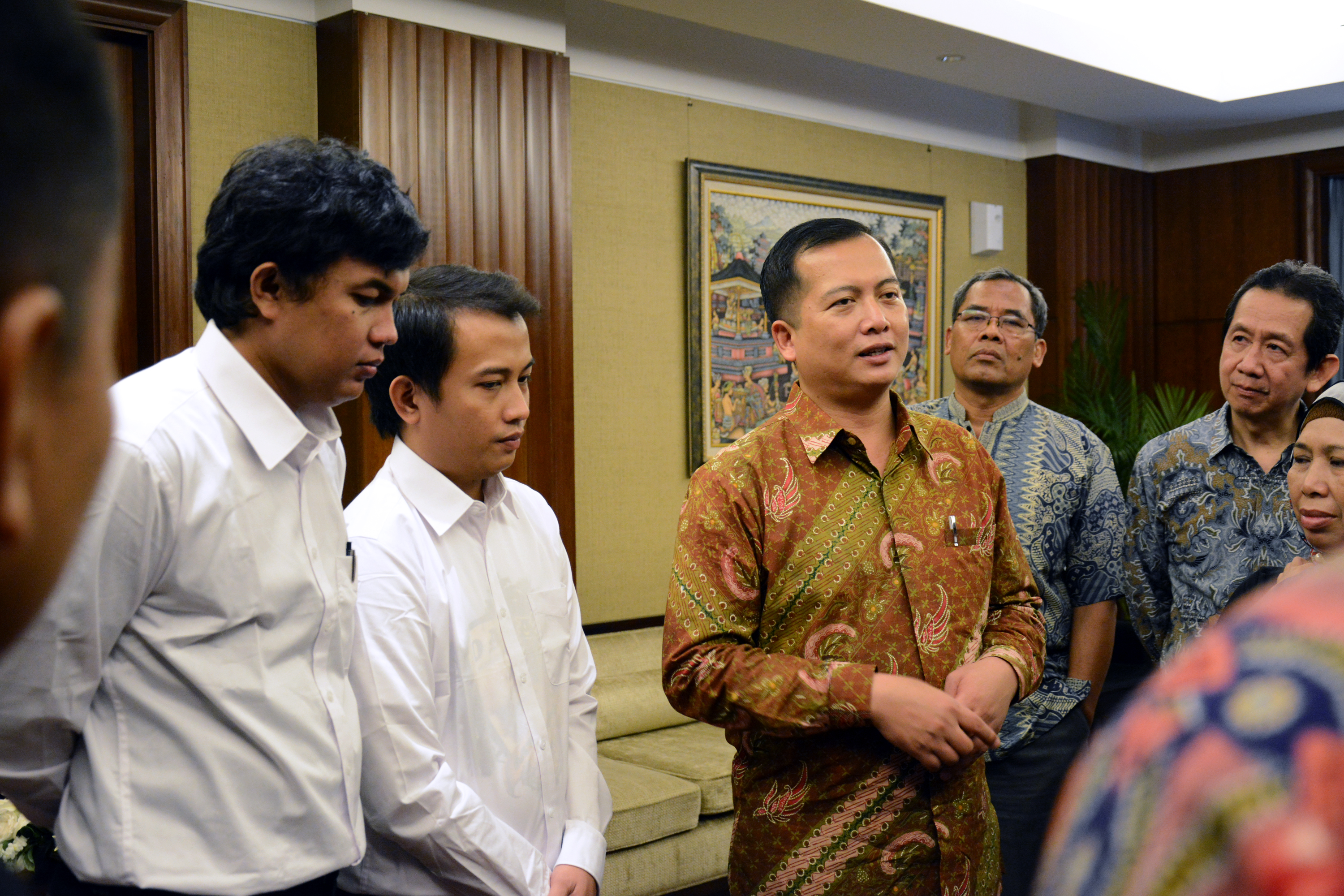 Lalu Muhamad Iqbal